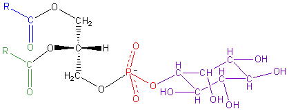 Phosphatidylinositol